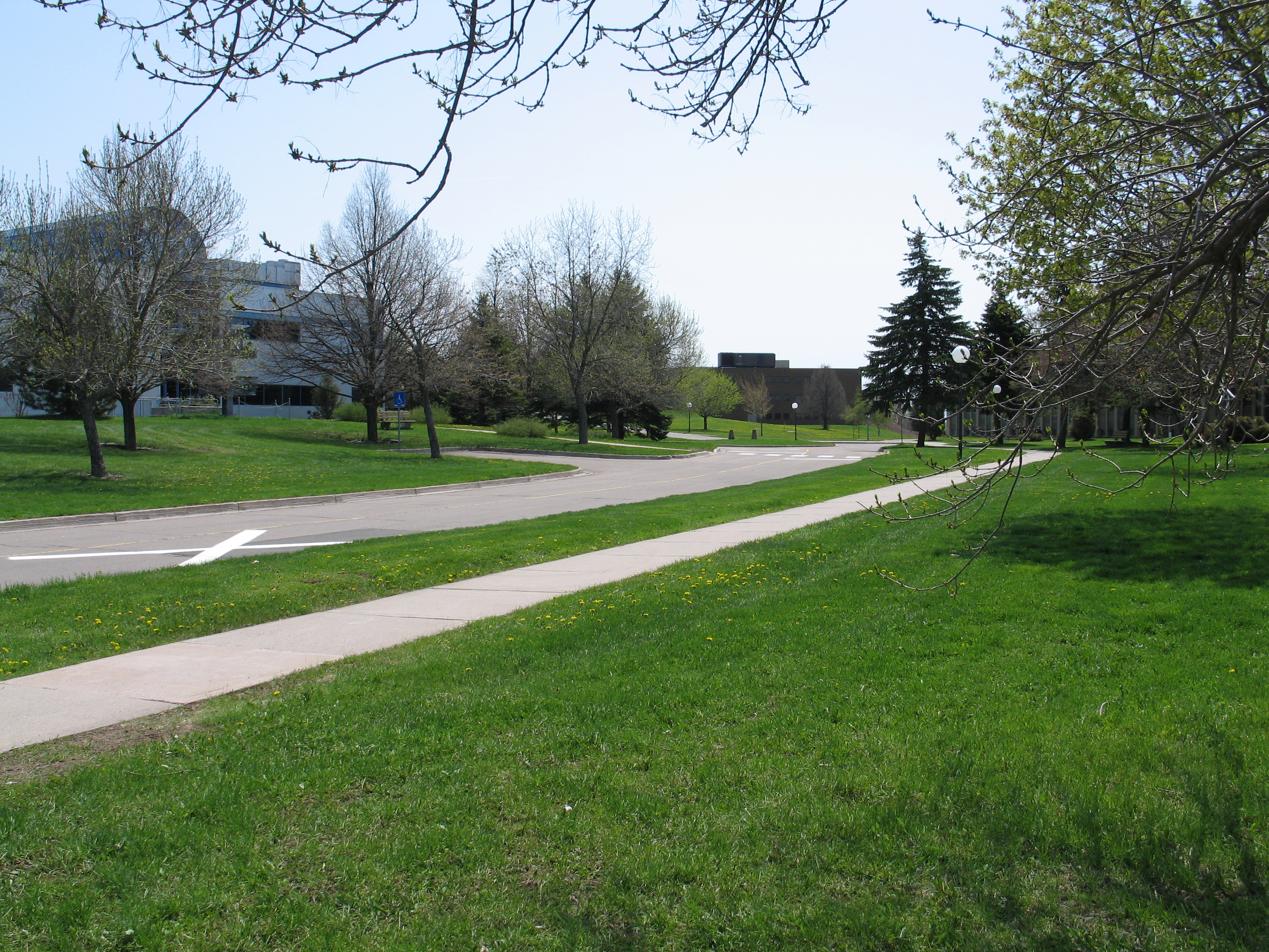 L'édifice de la faculté d'ingénierie de l'Université de Moncton, sur le campus de Moncton.